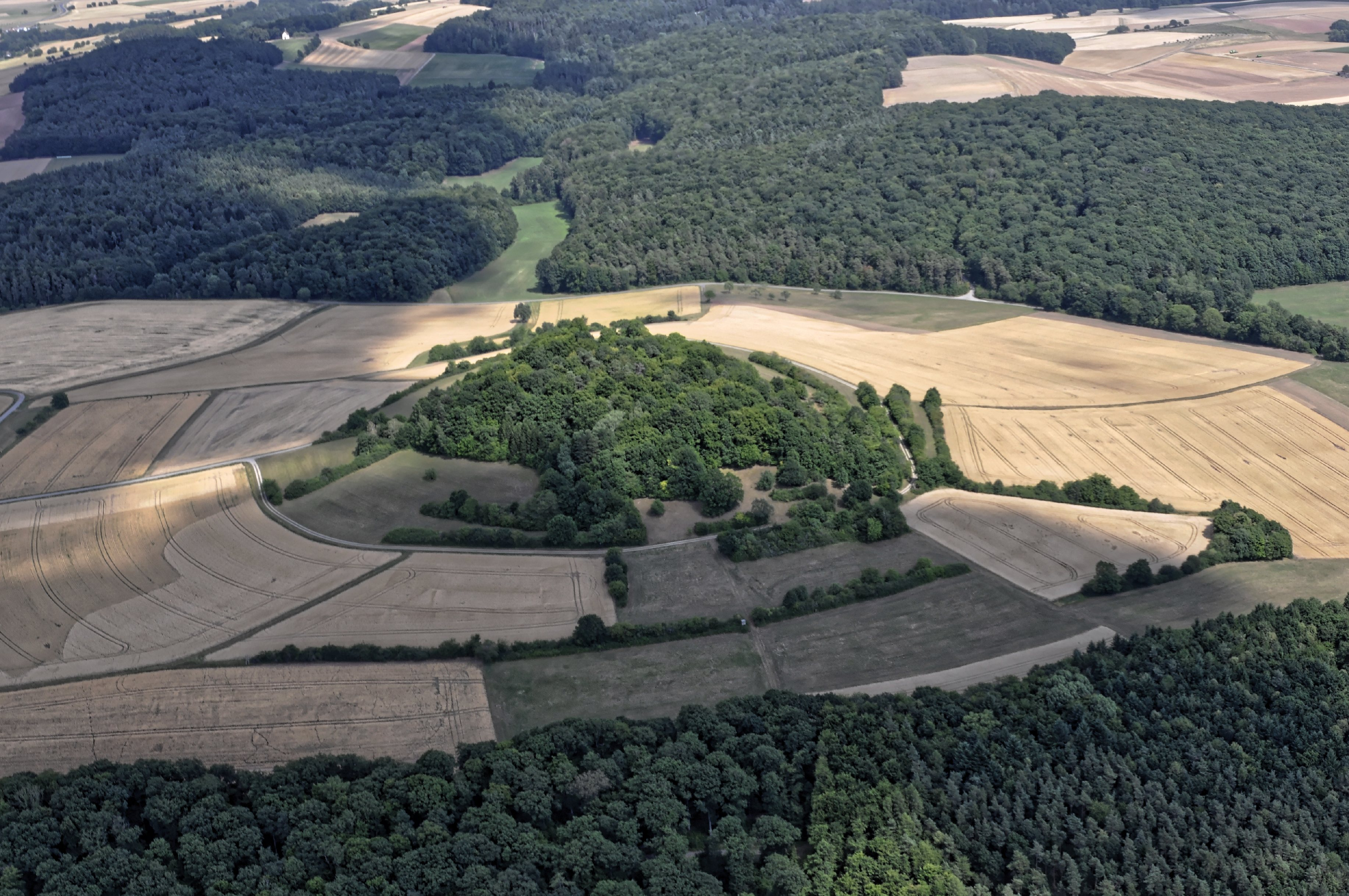 Bilder vom Flug Nordholz-Hammelburg 2015: Der Büchelberg bei Hetzlos.